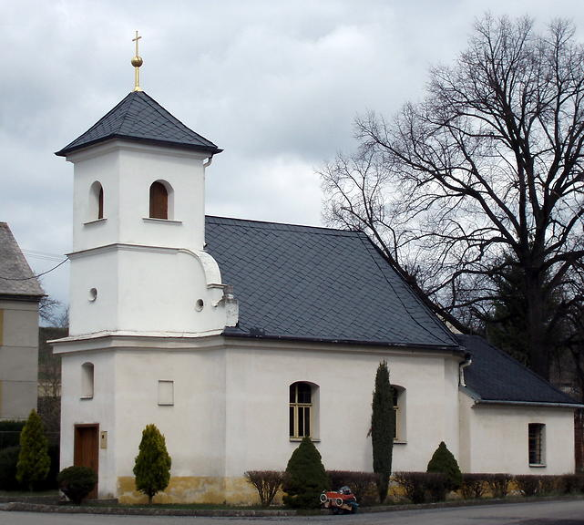 Kaple sv. Anny (Lutotín), náves, Lutotín